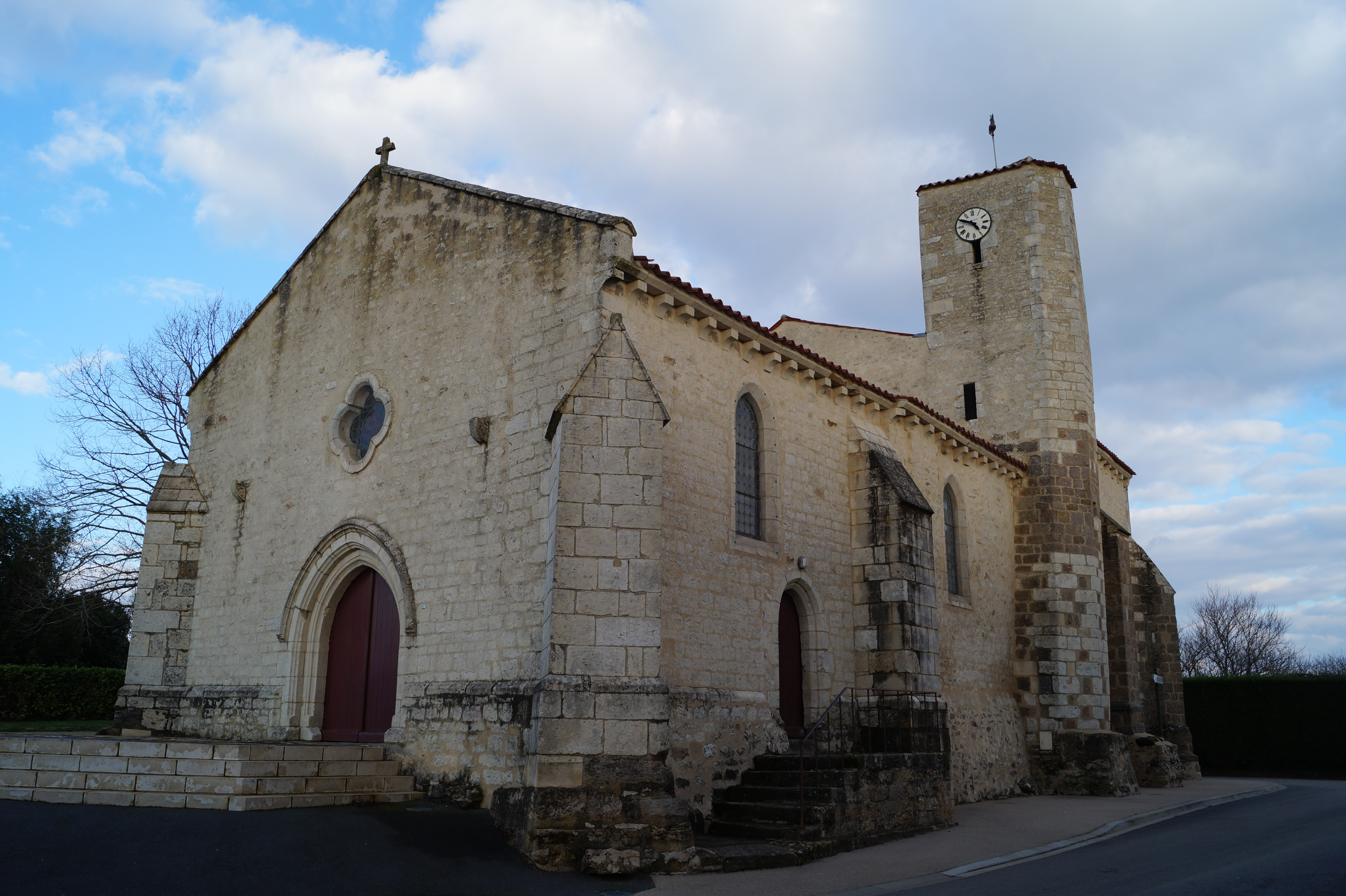 L’église Saint-Martin de Saint-Martin-des-Fontaines.